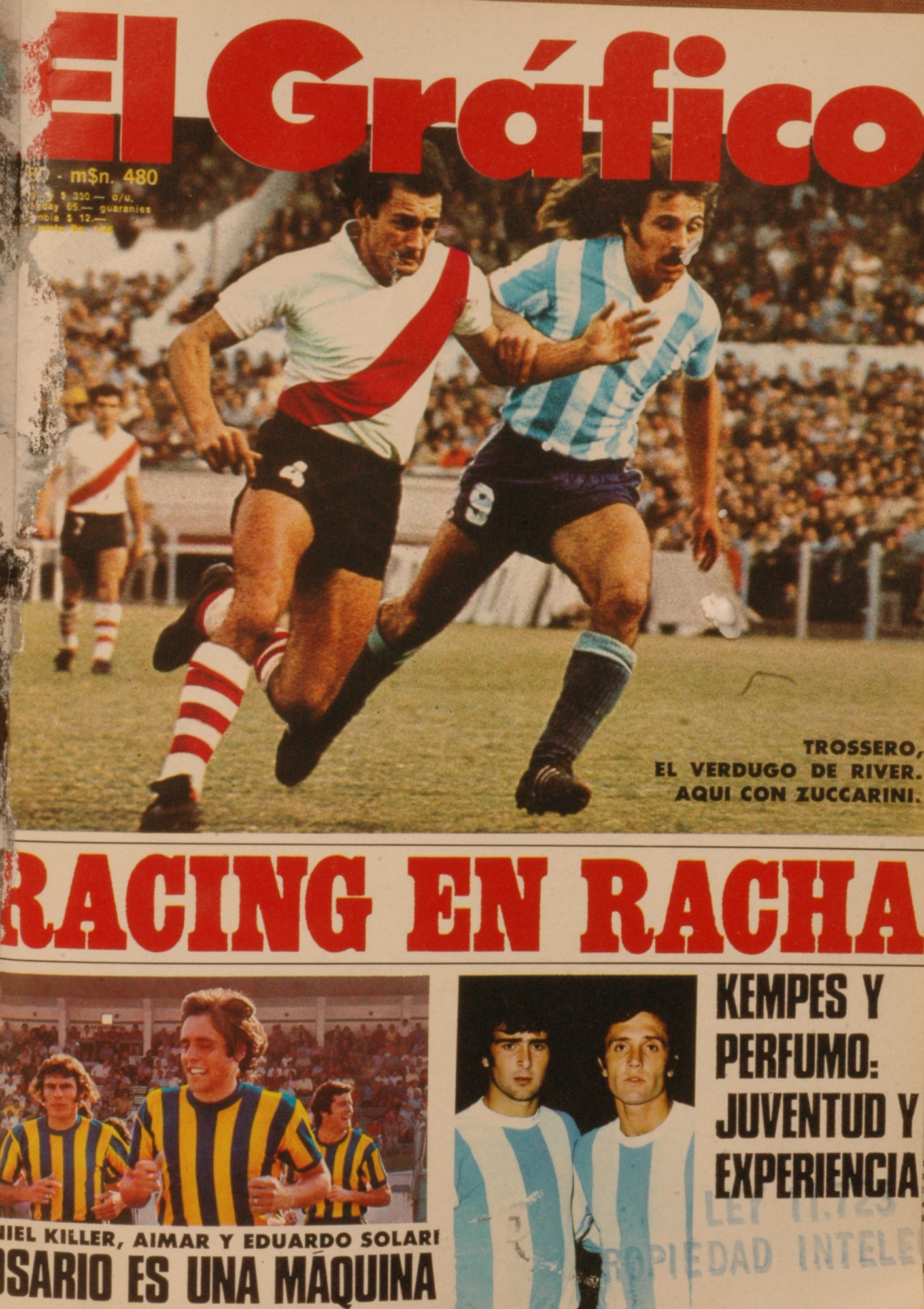 El Grafico del 30 de Abril de 1974. Edicion 2847